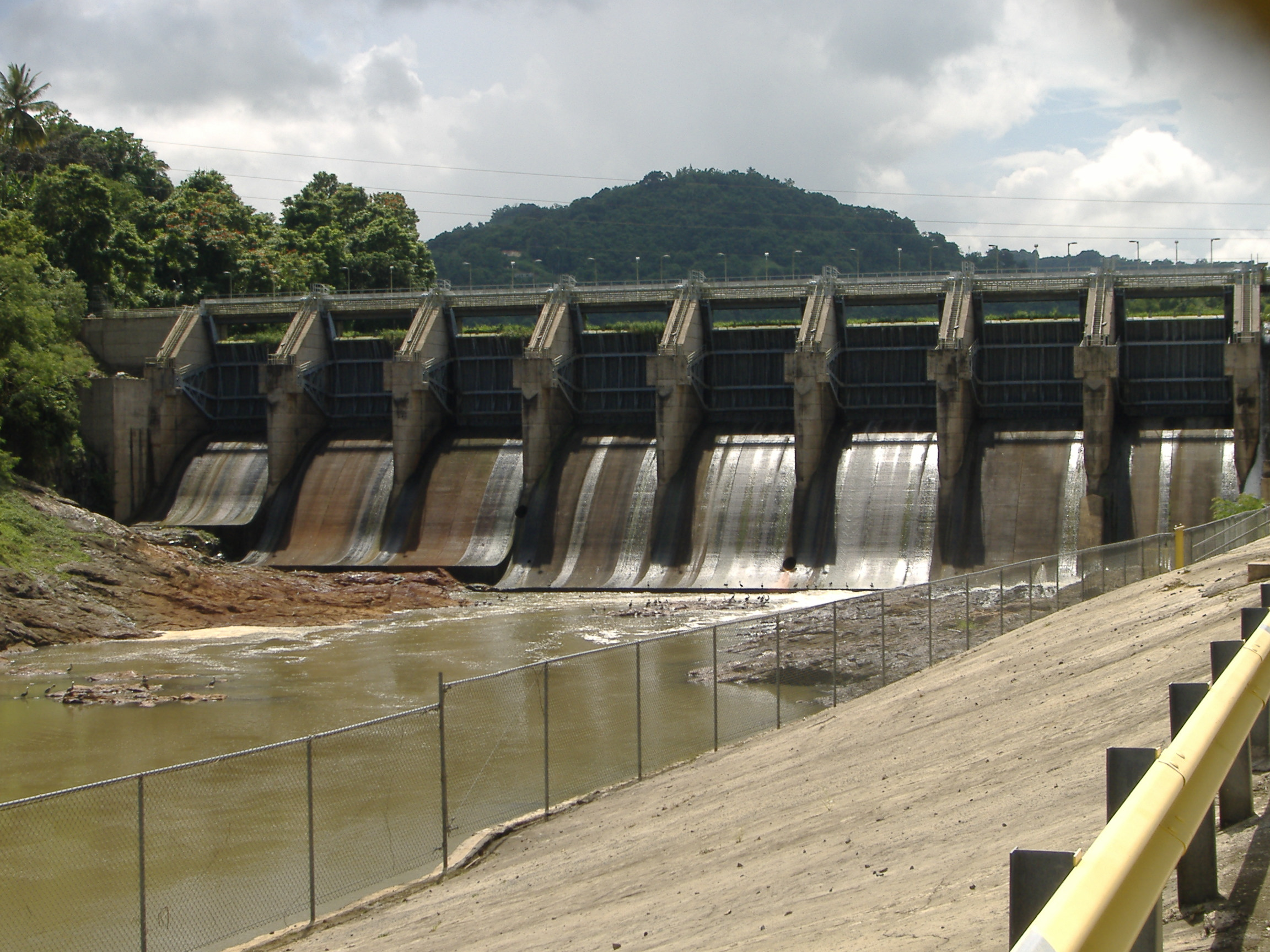 Carraízo Lake Dam in Trujillo Alto, Puerto Rico.